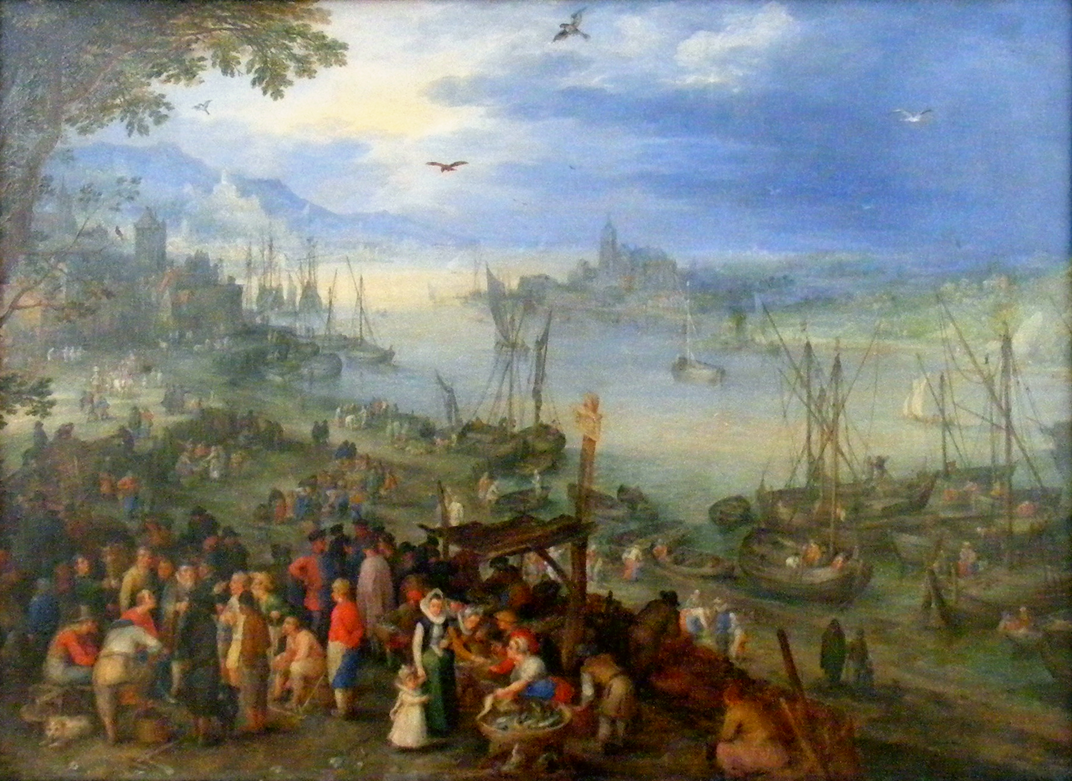 Fischmarkt am Ufer eines Flusses